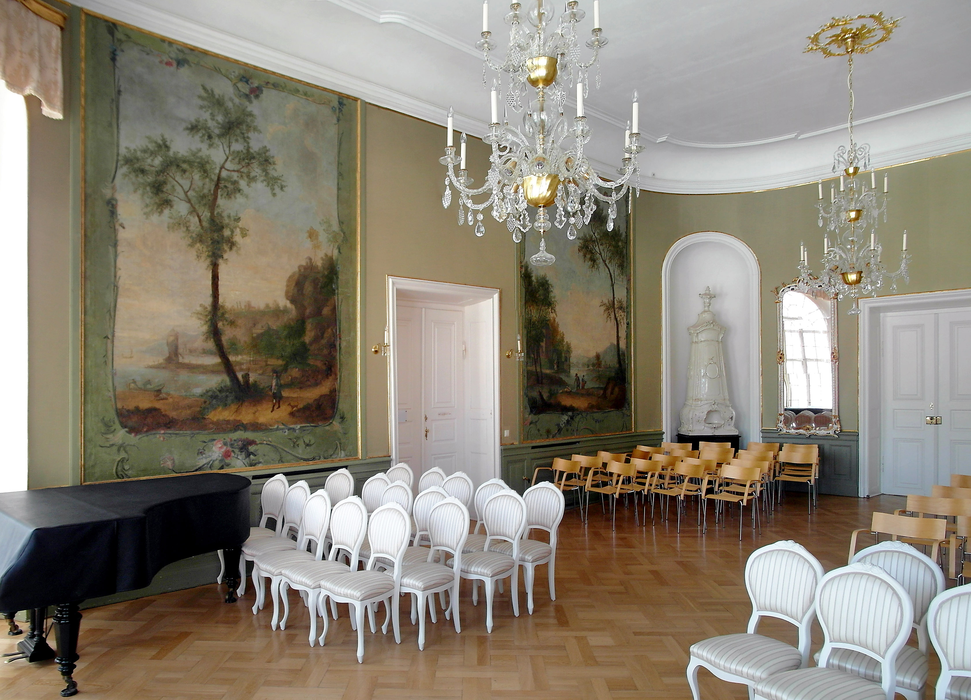 14.03.2013 01768 Reinhardtsgrimma (Glashütte), Schloßgasse 2 (GMP: 50.893047,13.757044): Schloß, Barockbau (1767) von J. F. Knöbel. Festsaal im Obergeschoß.[SAM5587+5589.JPG]20130314320MDR(c)Blobelt